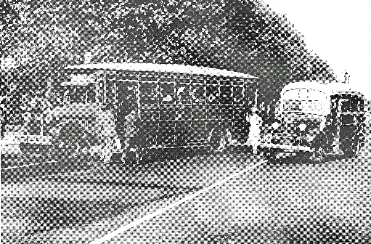 Ómnibus White de 28 asientos carrozado por Daneri de la línea 5 (Cía. Luso Argentina) y un colectivo Chevrolet '39 carrocería el Trebol de 11 asientos de la línea 36)